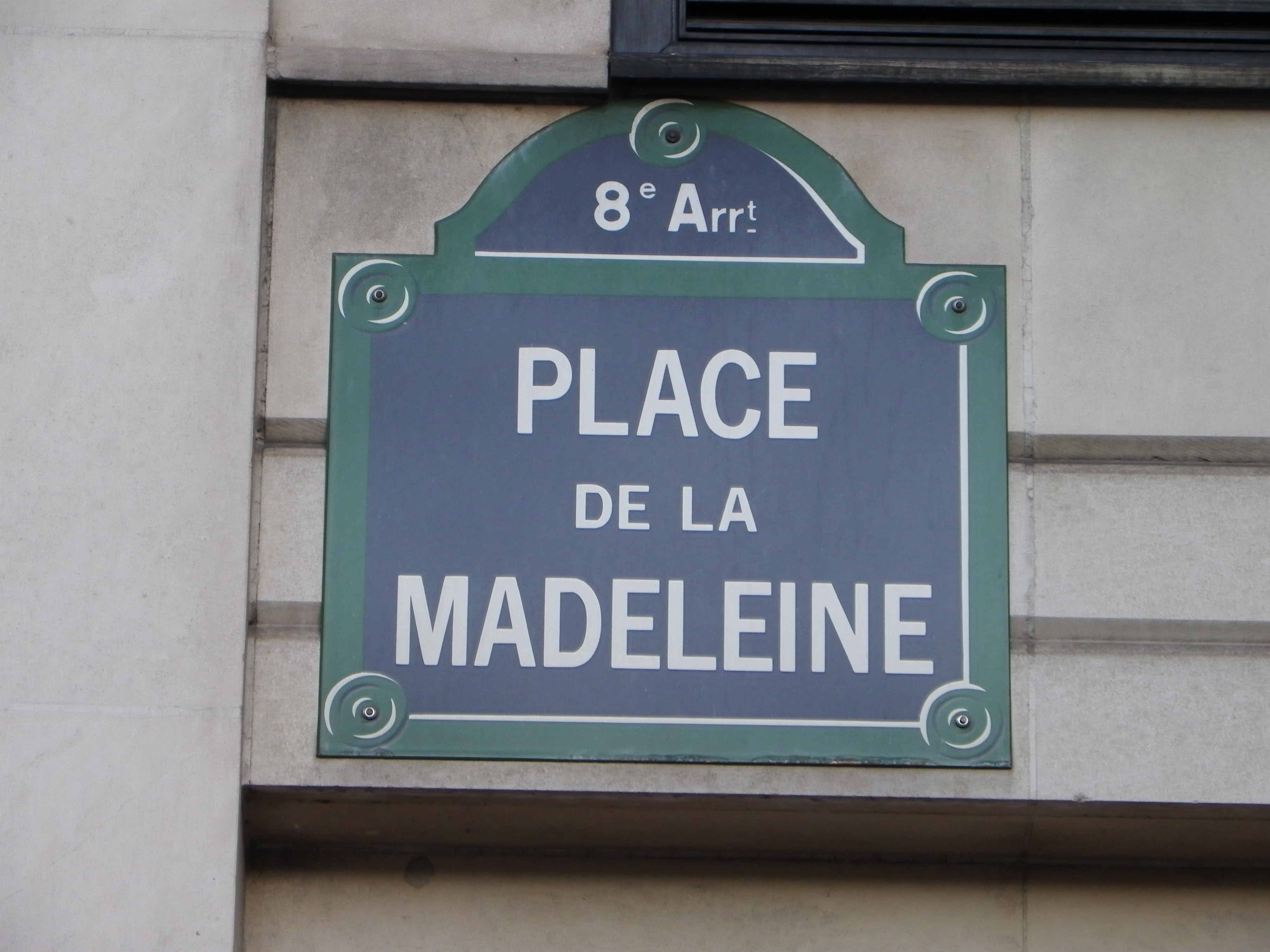 Plaque de la place de la Madeleine à Paris